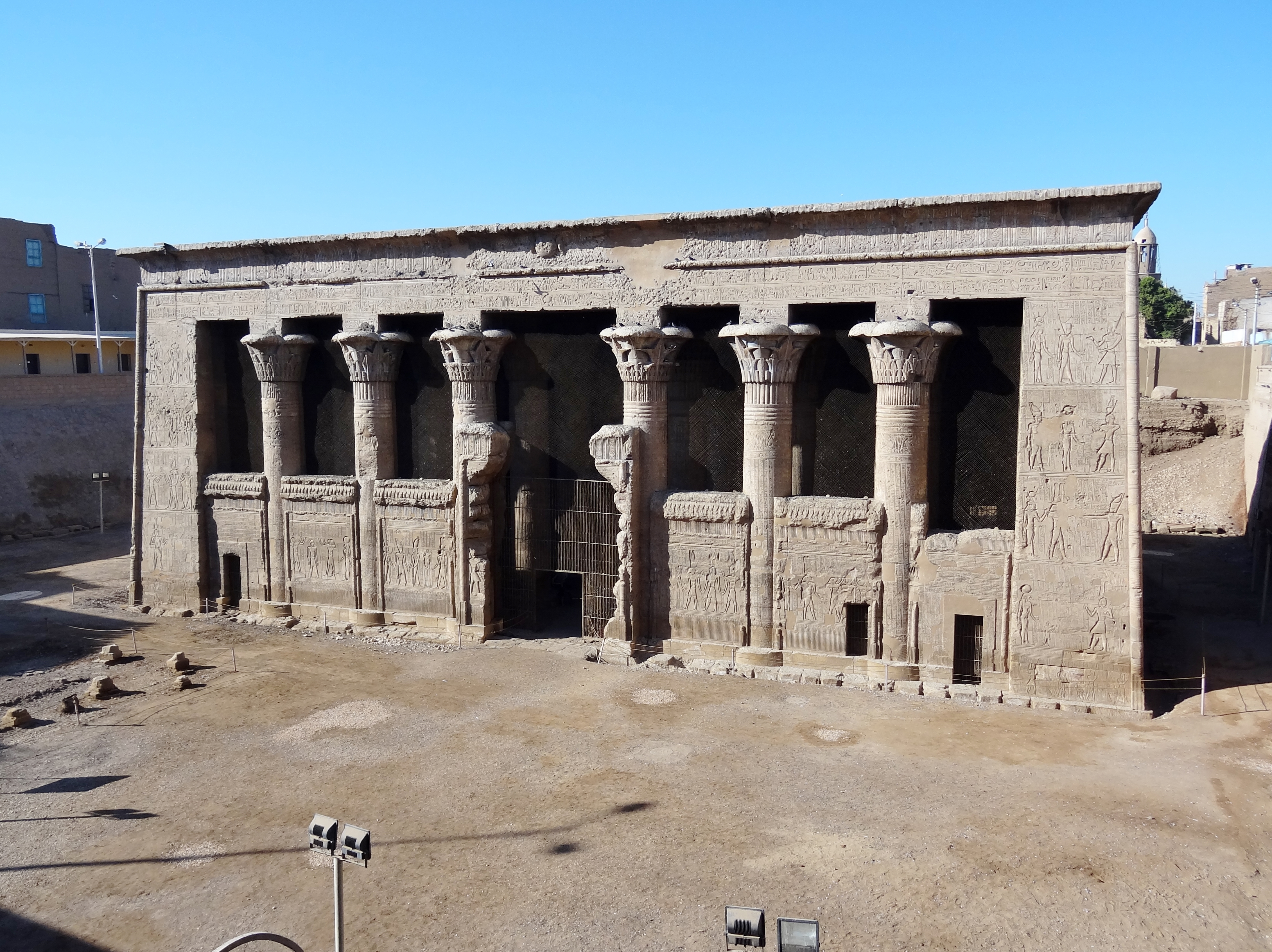 Pronaos des Tempels von Esna aus römischer Zeit, Ägypten